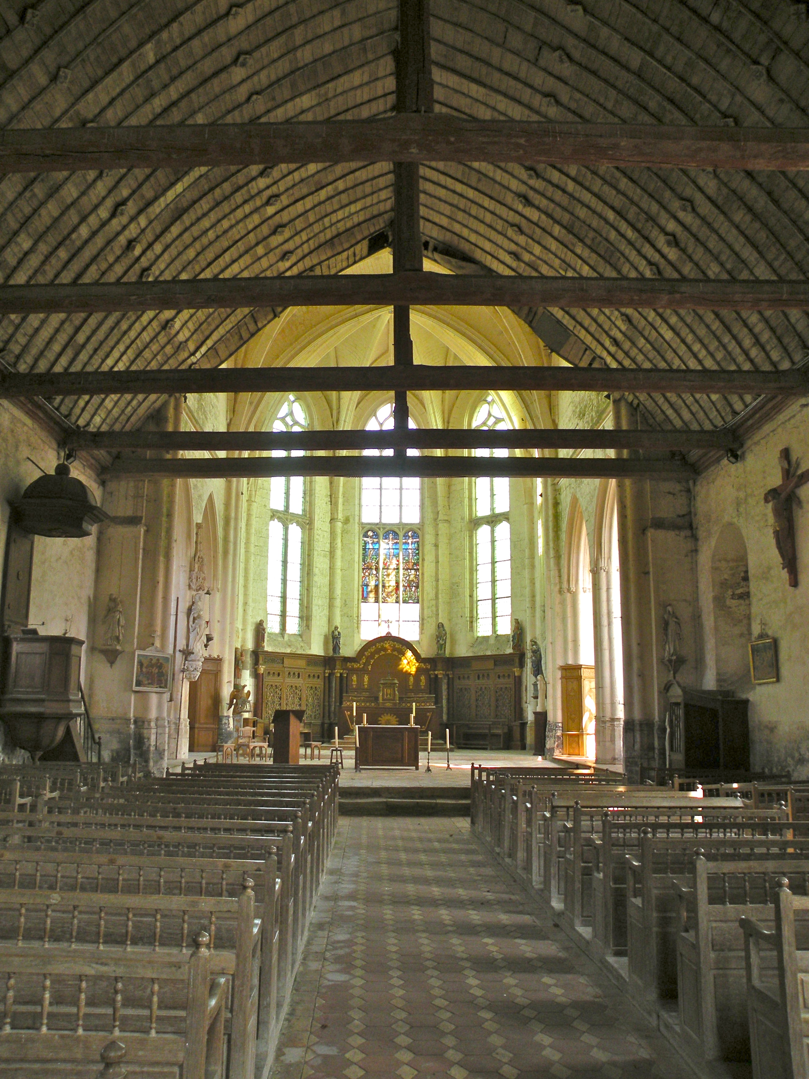 Intérieur de l'église Saint-Denis d'Hodenc-en-Bray